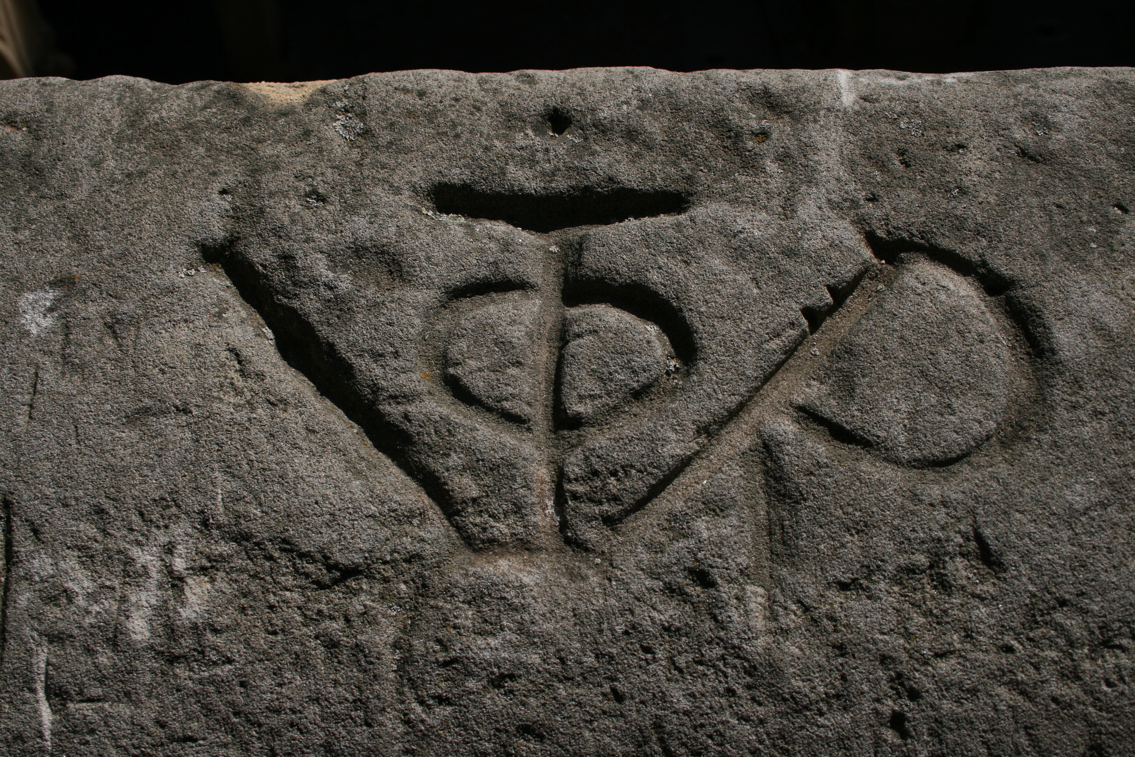 Victor